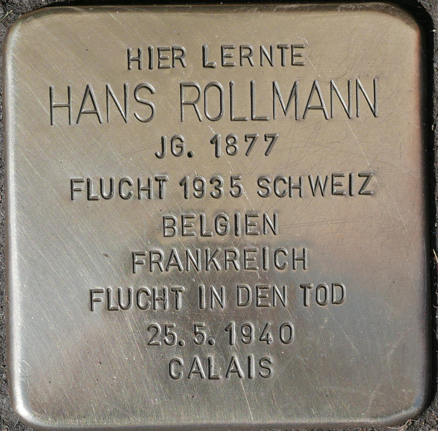 Stolpersteine Köln, Gymnasium Kreuzgasse, Stolperstein für Hans Rollmann